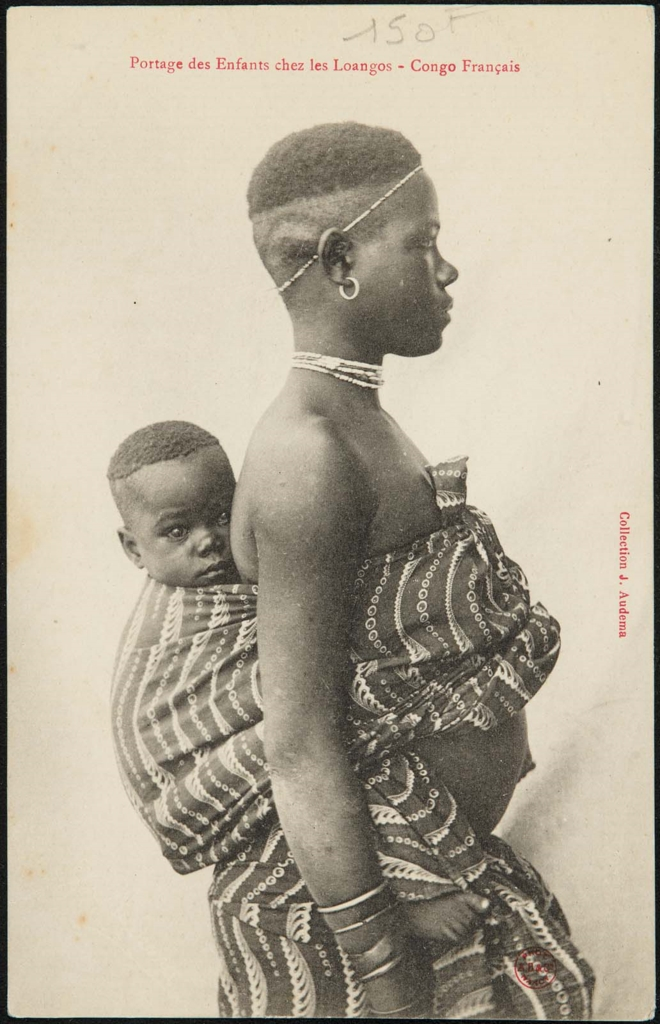 Portage des enfants chez les Loangos - Congo Français DIMENSIONS MFA = Museum of Fine Art (Boston) Vertical: Overall: 14 x 8.9 cm (5 1/2 x 3 1/2 in.) ACCESSION NUMBER 2012.4468 MEDIUM OR TECHNIQUE Collotype on card stock NOT ON VIEW COLLECTIONS: Africa and Oceania, Europe, Prints and Drawings CLASSIFICATIONS: Postcards Back: undivided. Mint Provenance: Between 1950 and 2011, acquired by Leonard A. Lauder, New York, from various postcard dealers in the United States, Canada and Europe; 2012, gift of Leonard A. Lauder to the MFA. (Accession Date: April 25, 2012) Credit Line Leonard A. Lauder Postcard Archive—Gift of Leonard A. Lauder